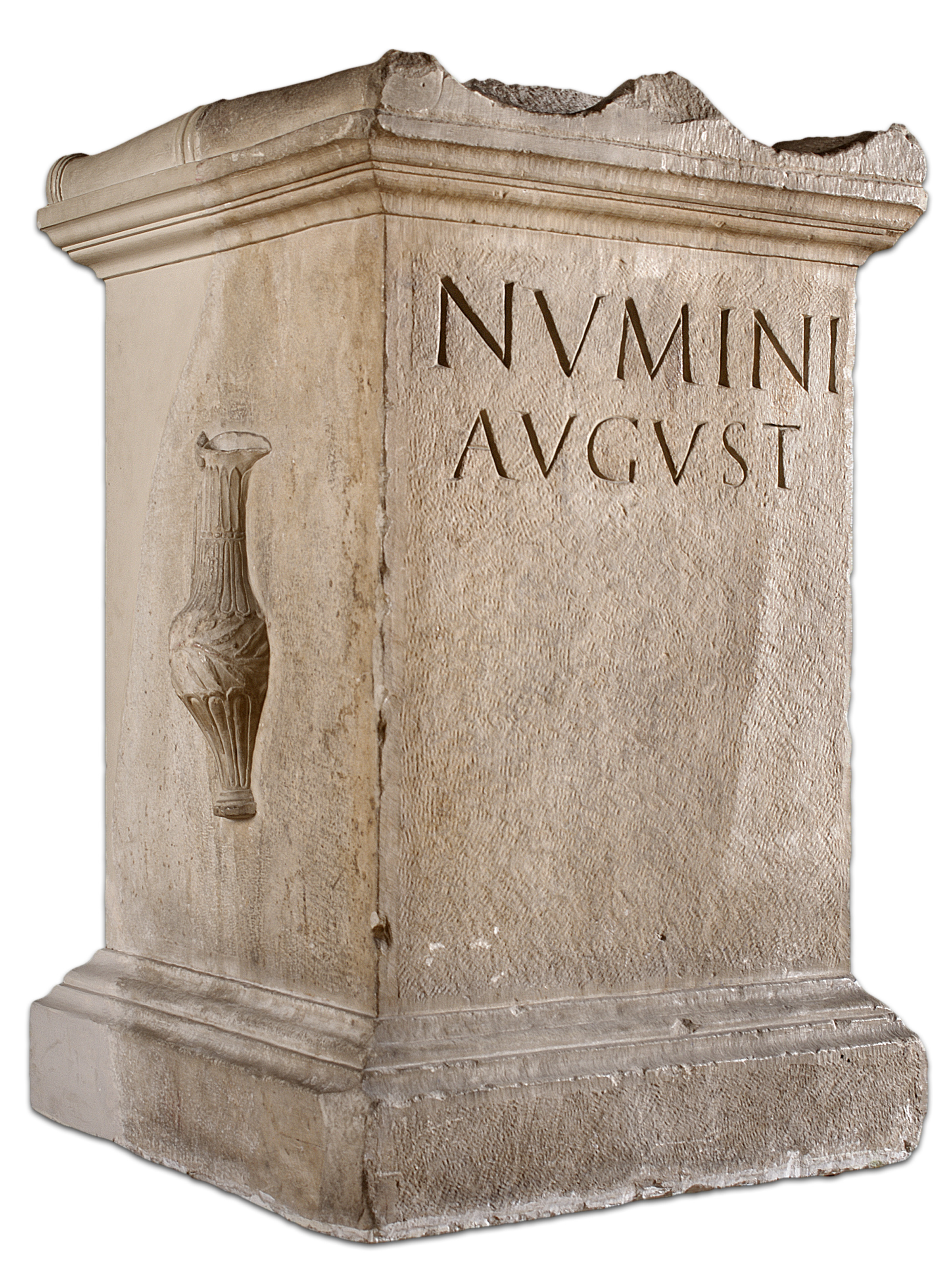 Ara amb inscripció dedicada al Numen dels Augusts. Procedeix del teatre de Tàrraco on, probablement, estava situada a l'orchestra. Es devia utilitzar en les cerimònies rituals prèvies a l'inici dels espectacles teatrals. MNAT 7590